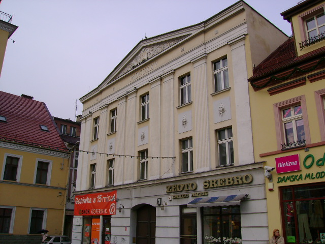 mansion in Rybnik